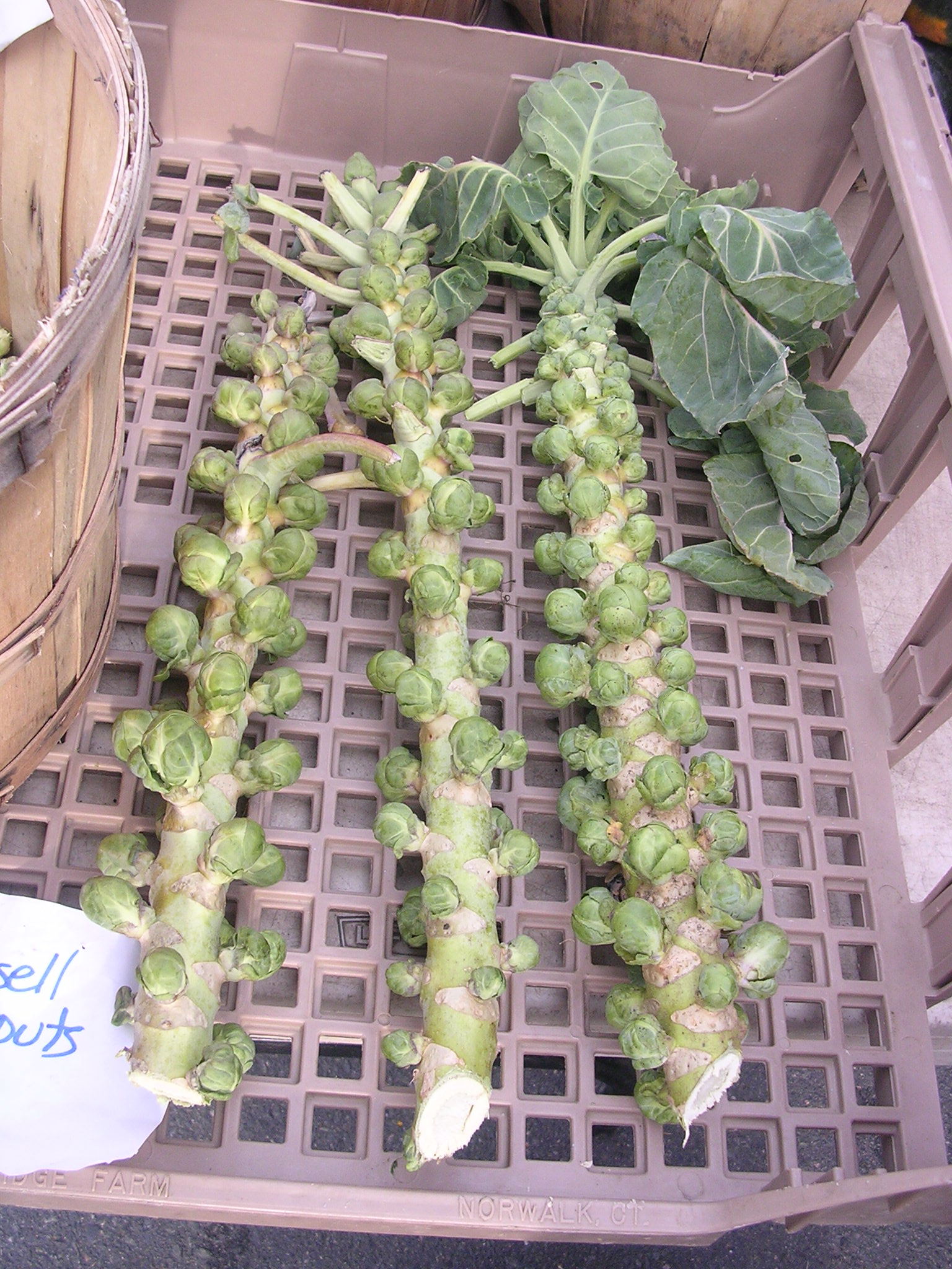 Brussels sprouts on stalks, taken at a farmers' market in Massachusetts.